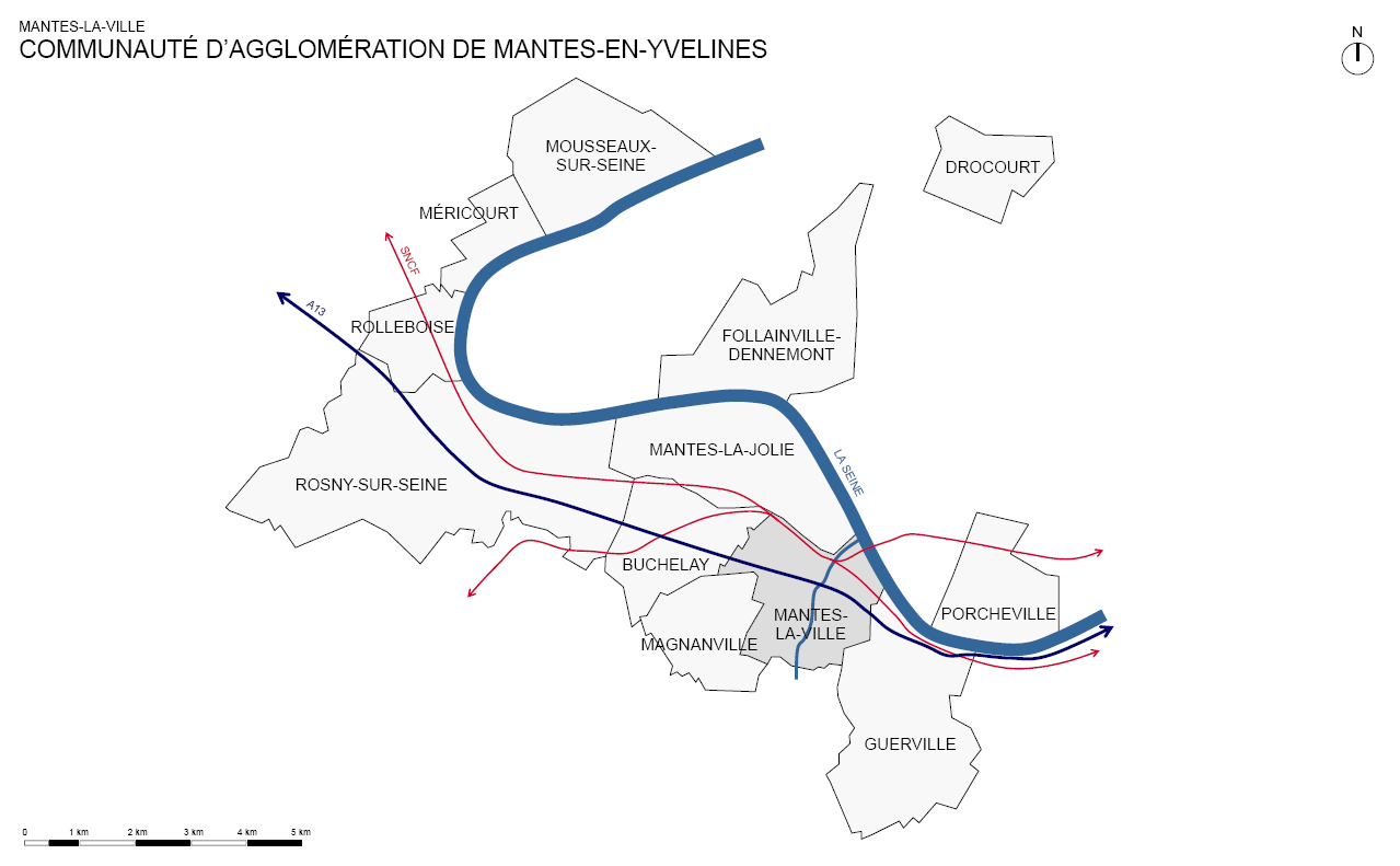 Communauté d'agglomération de Mantes-en-Yvelines, Mantes-la-Ville